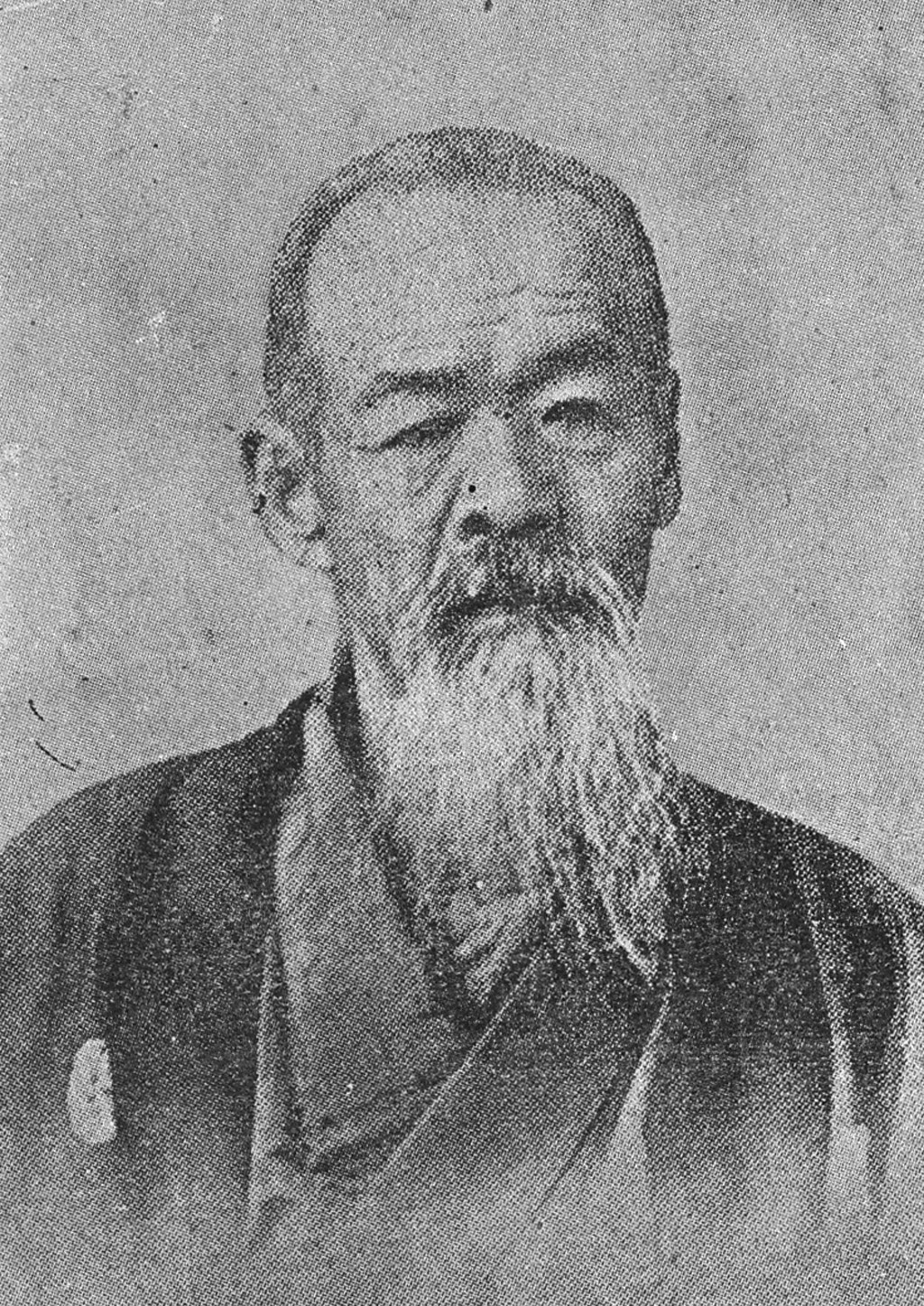 Portrait of Kaetsu Ujifusa (嘉悦氏房, 1834 – 1908)